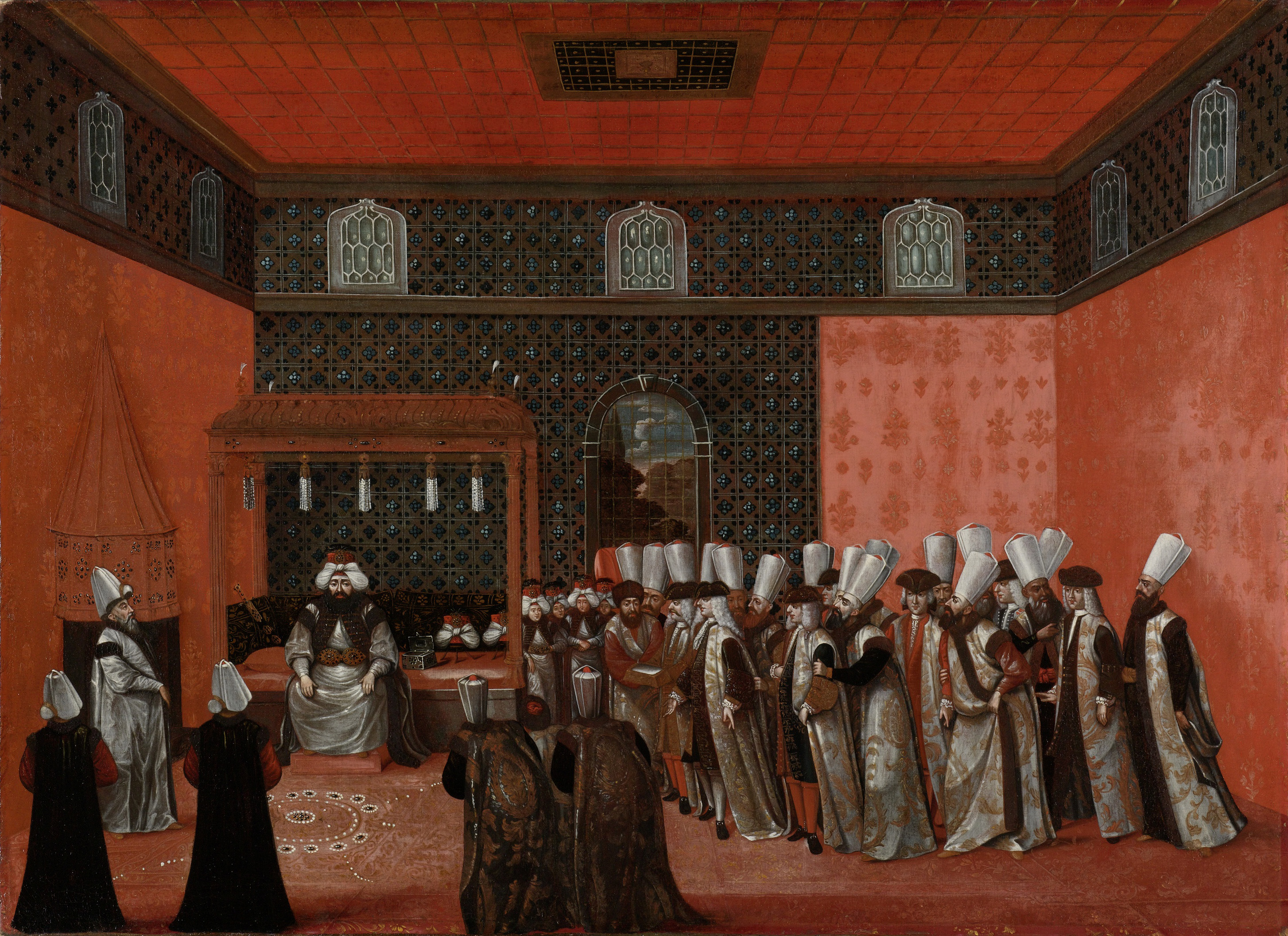 Een ambassadeur op audiëntie bij sultan Ahmed III. Uiterst links spreekt de grootvizier de ambassadeur toe. Links zit de sultan op zijn troon. Rechts de ambassadeur met zijn gevolg en Turkse ambtsdragers (vergelijk SK-A-4078).